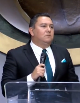 Apóstol Javier Bertucci - Panamá 2017